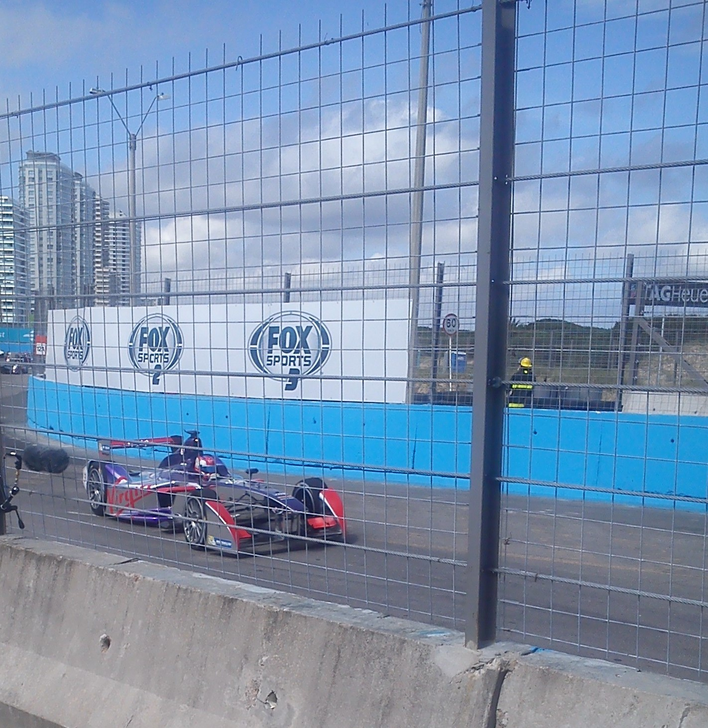 Jaime Alguersuari en el ePrix de Punta del Este del 2014, fecha valida por la Formula E.